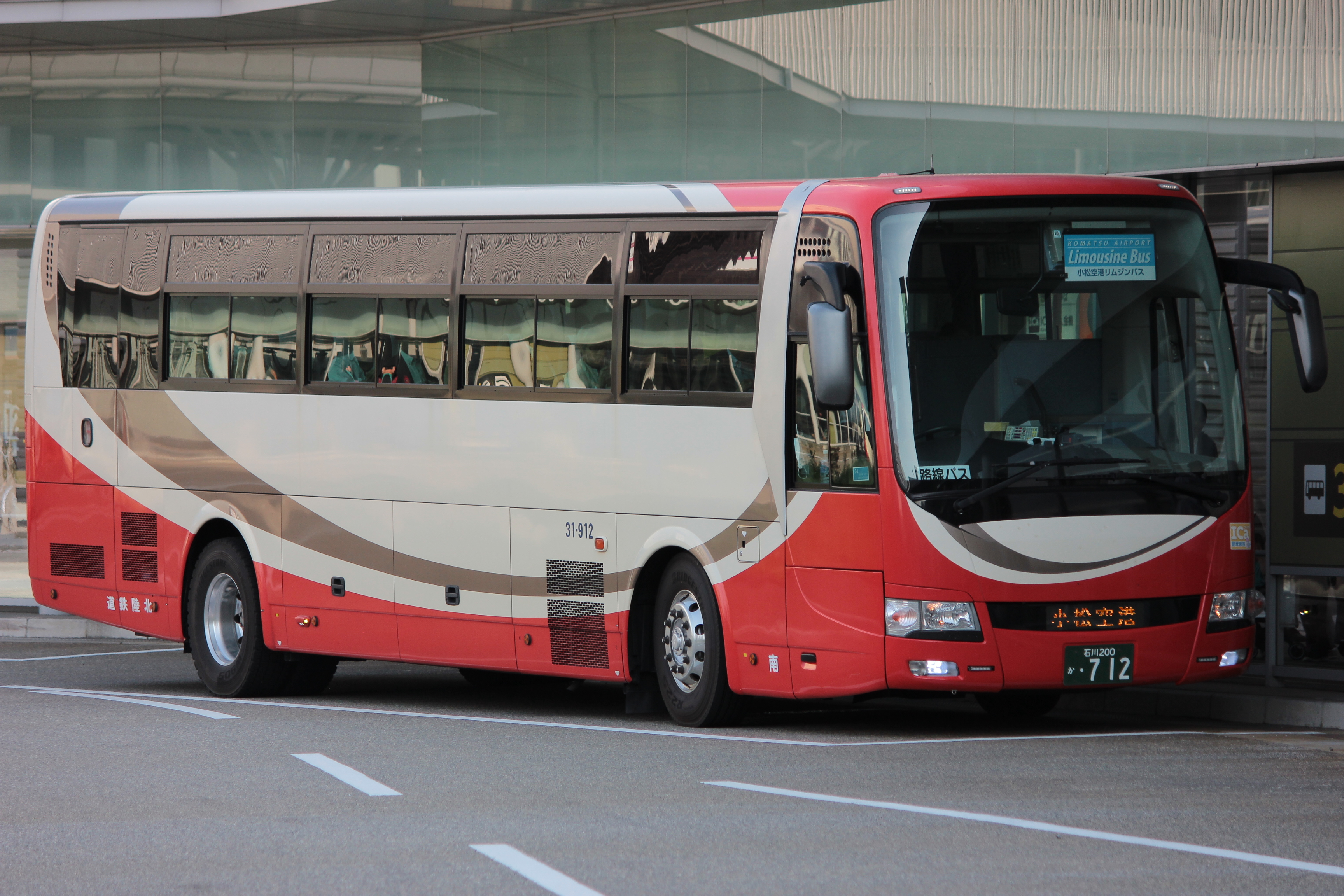 北陸鉄道の小松空港リムジンバス（金沢駅西口） Canon EOS Kiss X5